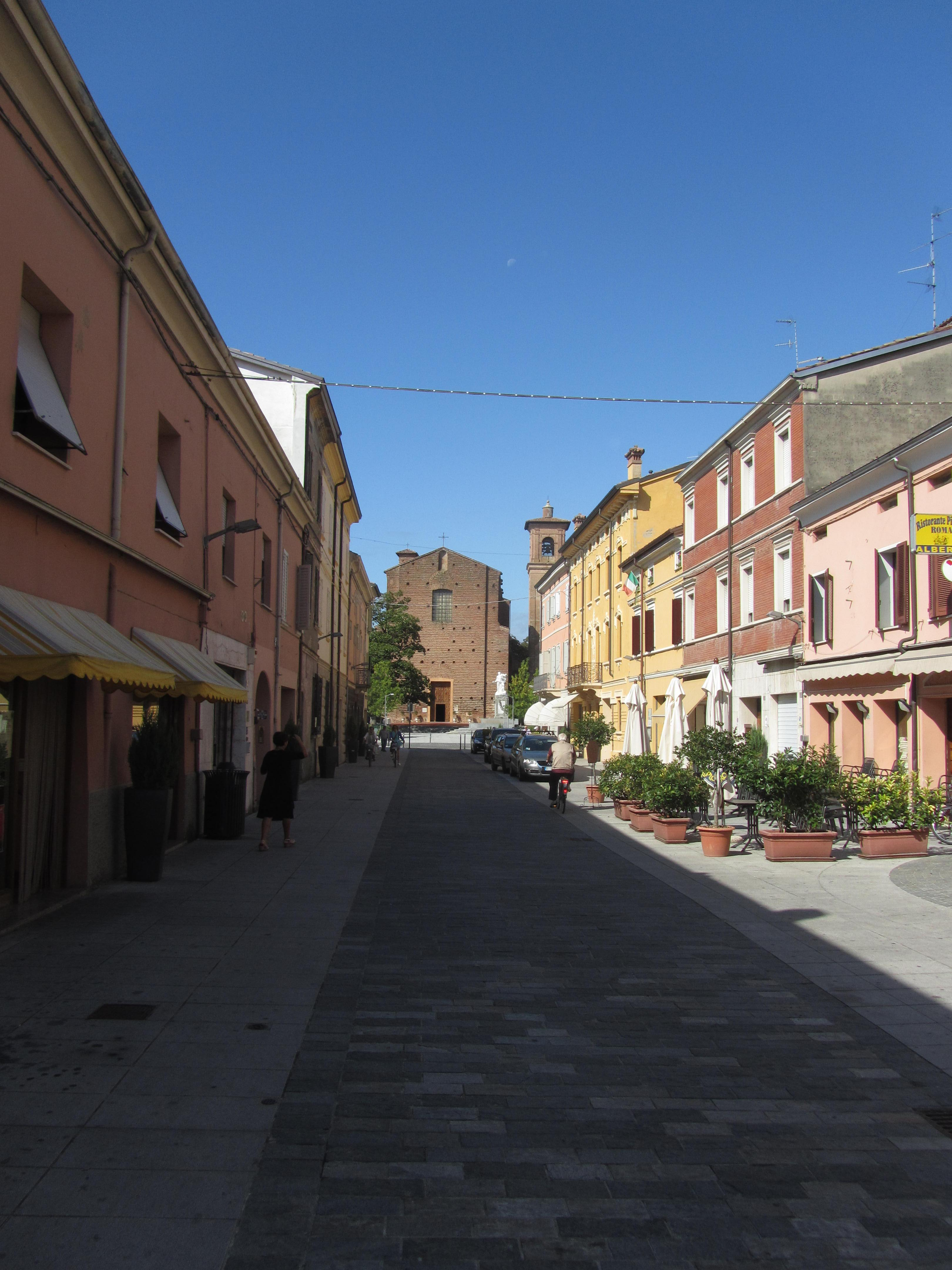 Via Roma a Fabbrico, provincia di Reggio Emilia.